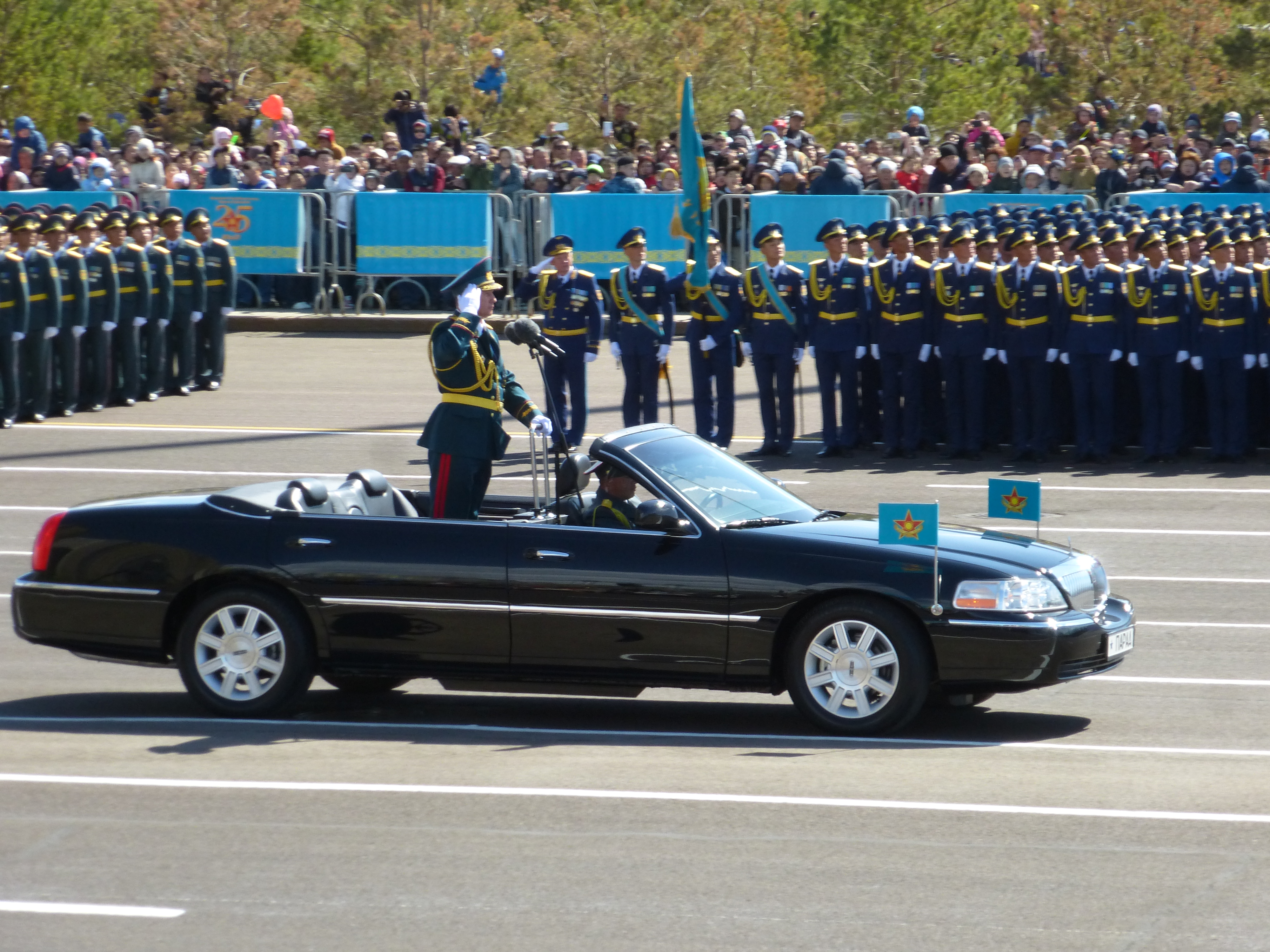 Эксклюзивный кабриолет Lincoln Town Car для военных парадов. Астана. 7 мая 2017 года